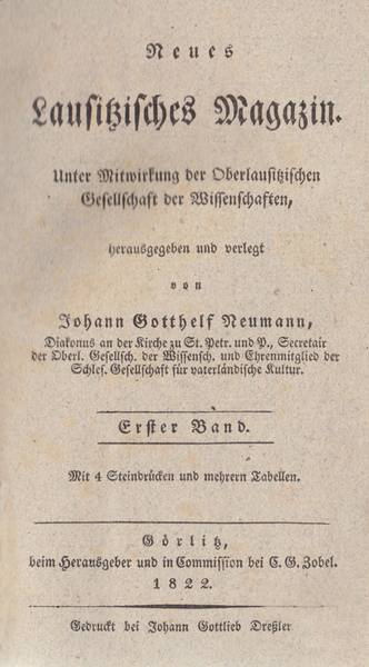 Neues Lausitzisches Magazin. Titelseite des ersten Bandes 1822